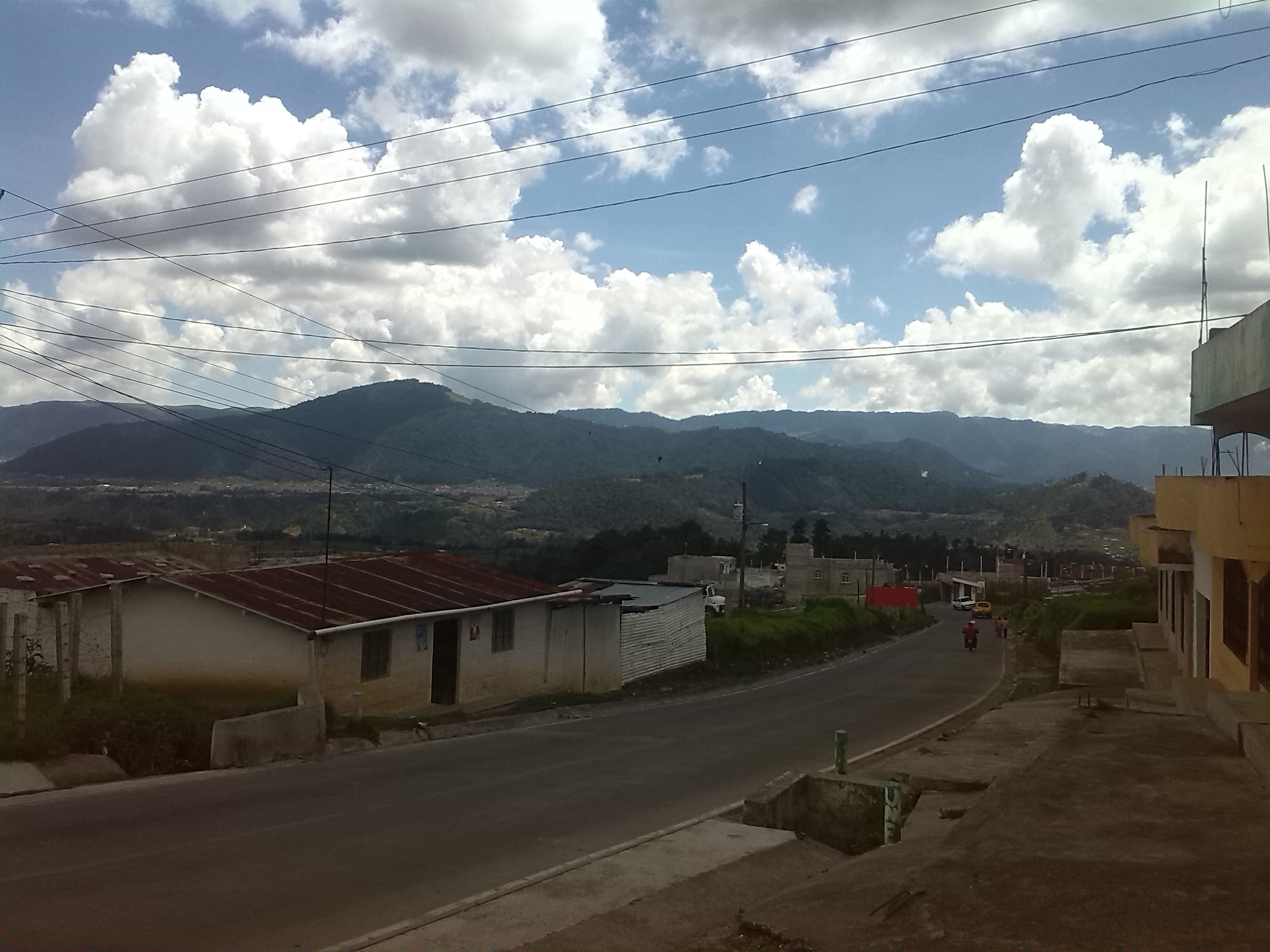 este son algunas fotos de este bello municipio, caracterizado por su gente trabajadora